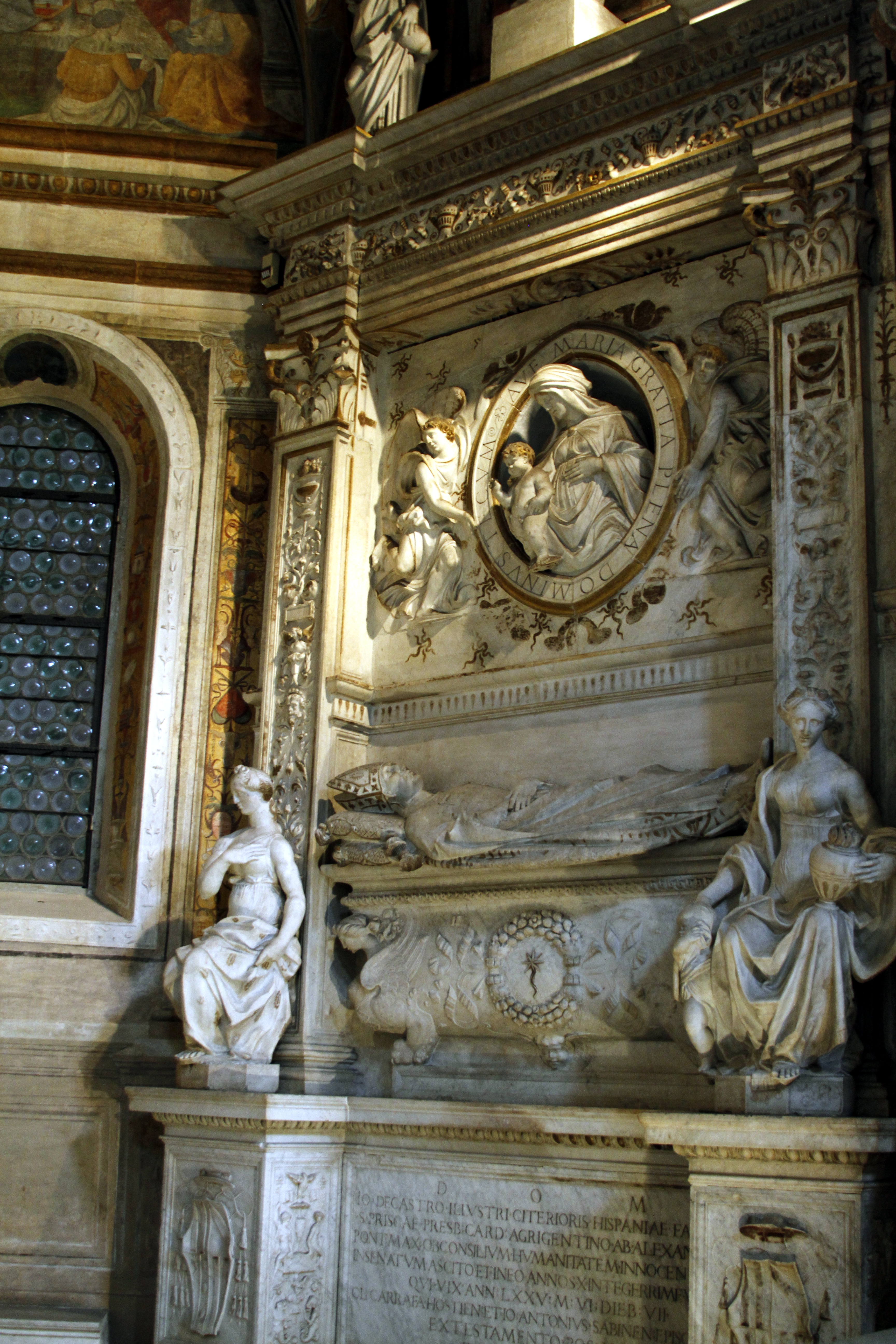 Santa Maria del Popolo - Rome